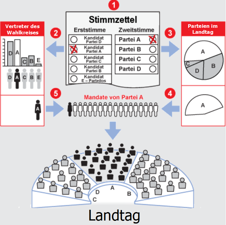 Wahl des Landtags (Deutschland)